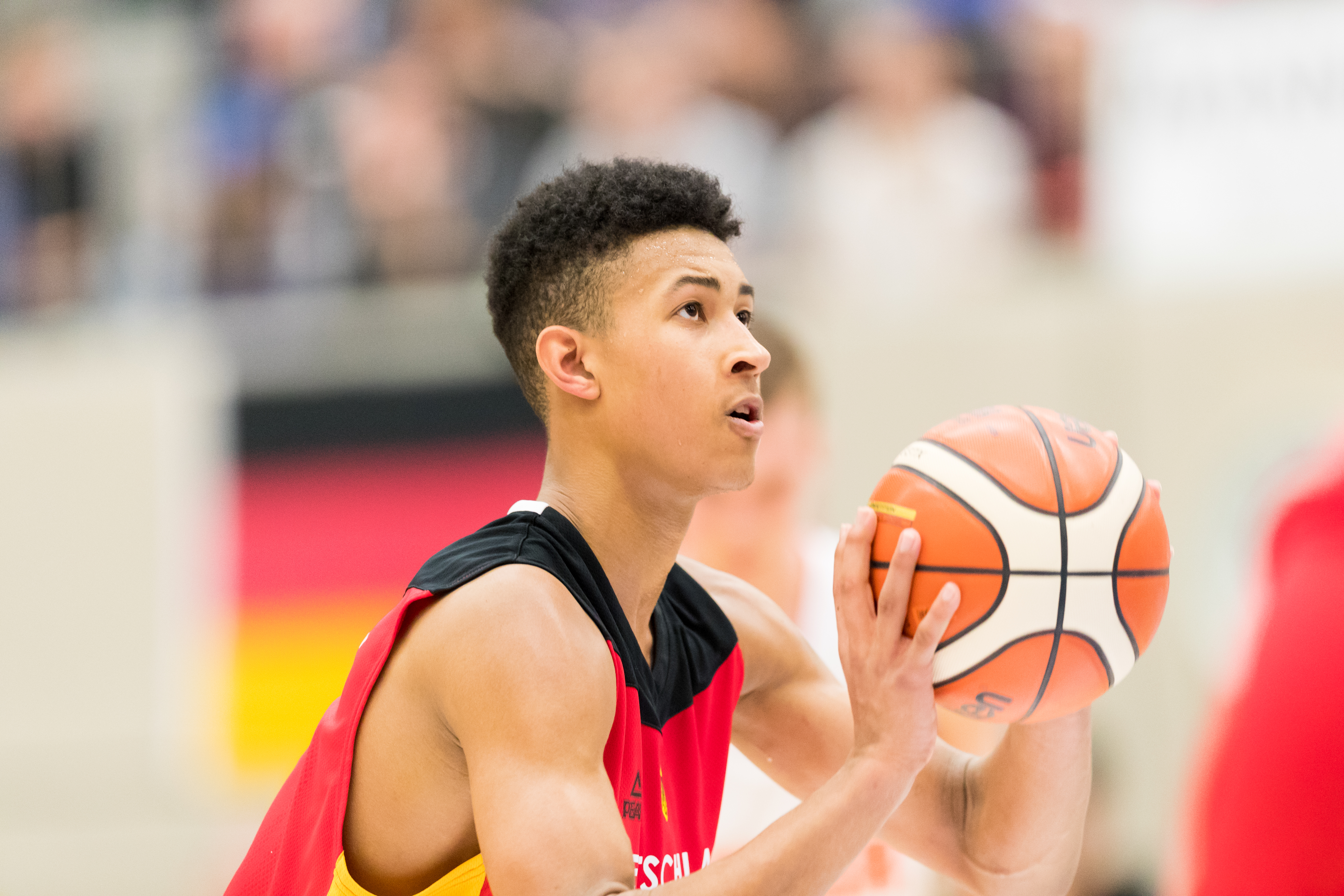 Germany vs Russia 80:75 during semi-final Basketball Albert Schweitzer Turnier at GBG Halle, Mannheim, Baden-Württemberg, Germany on 2018-04-06, Photo: Sven Mandel